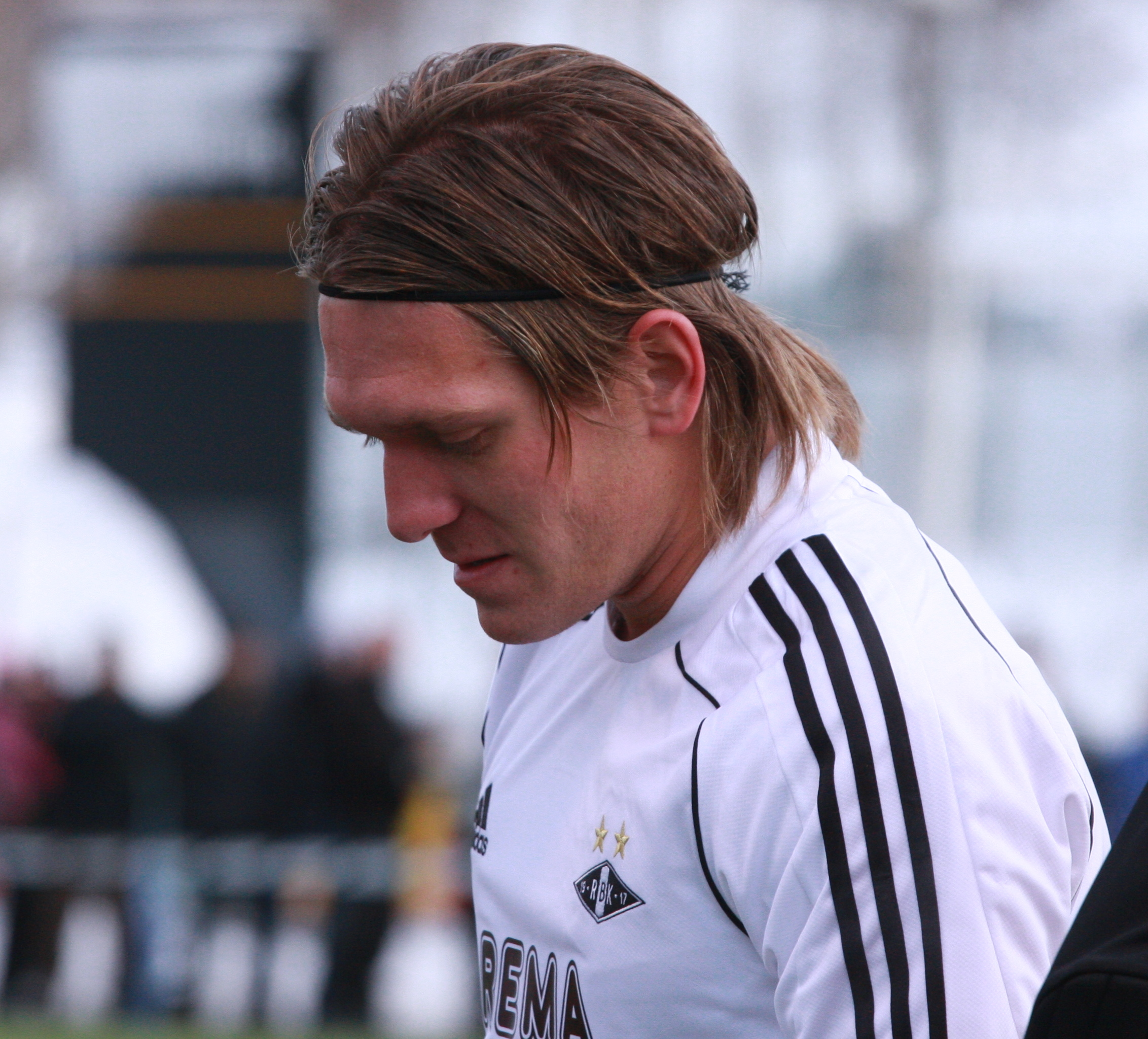 Kris Stadsgaard